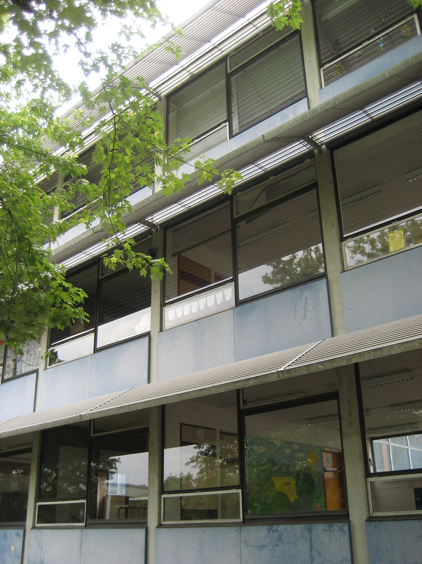 Humboldtschule Offenbach. Architekten Paul Friedrich Posenenske. Friedel Steinmeyer, Nürnberg & Fritz Novotny (1957)